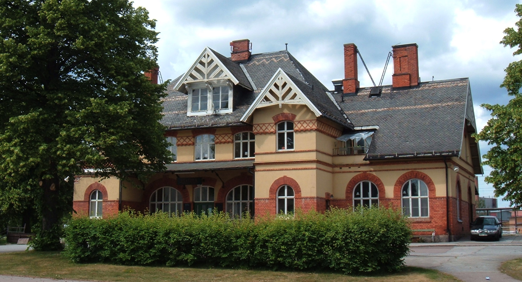 Skinnskattebergs station